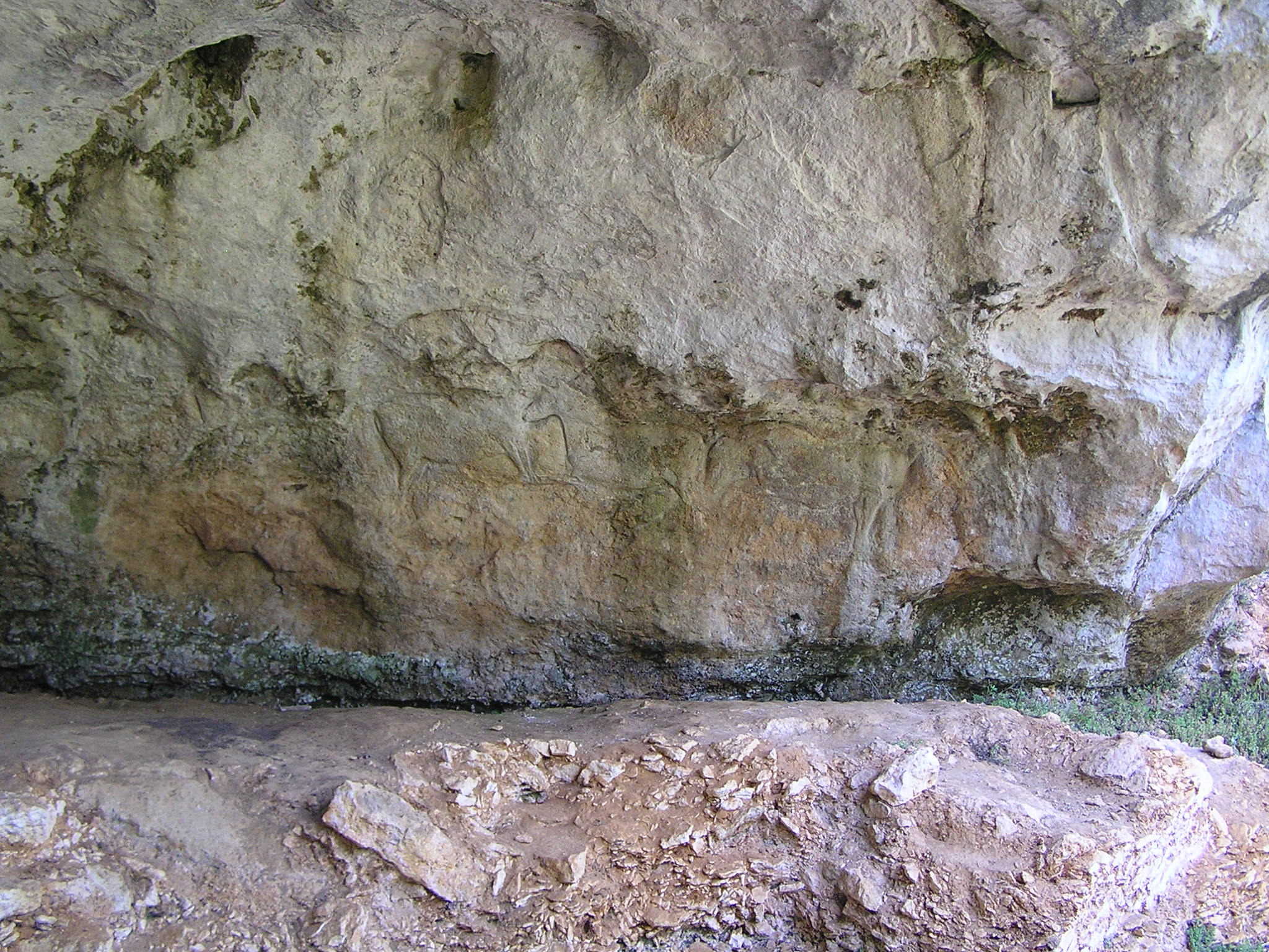 frise de chevaux de l'abri sous-roche de la chaire à Calvin de Mouthiers-sur-Boëme